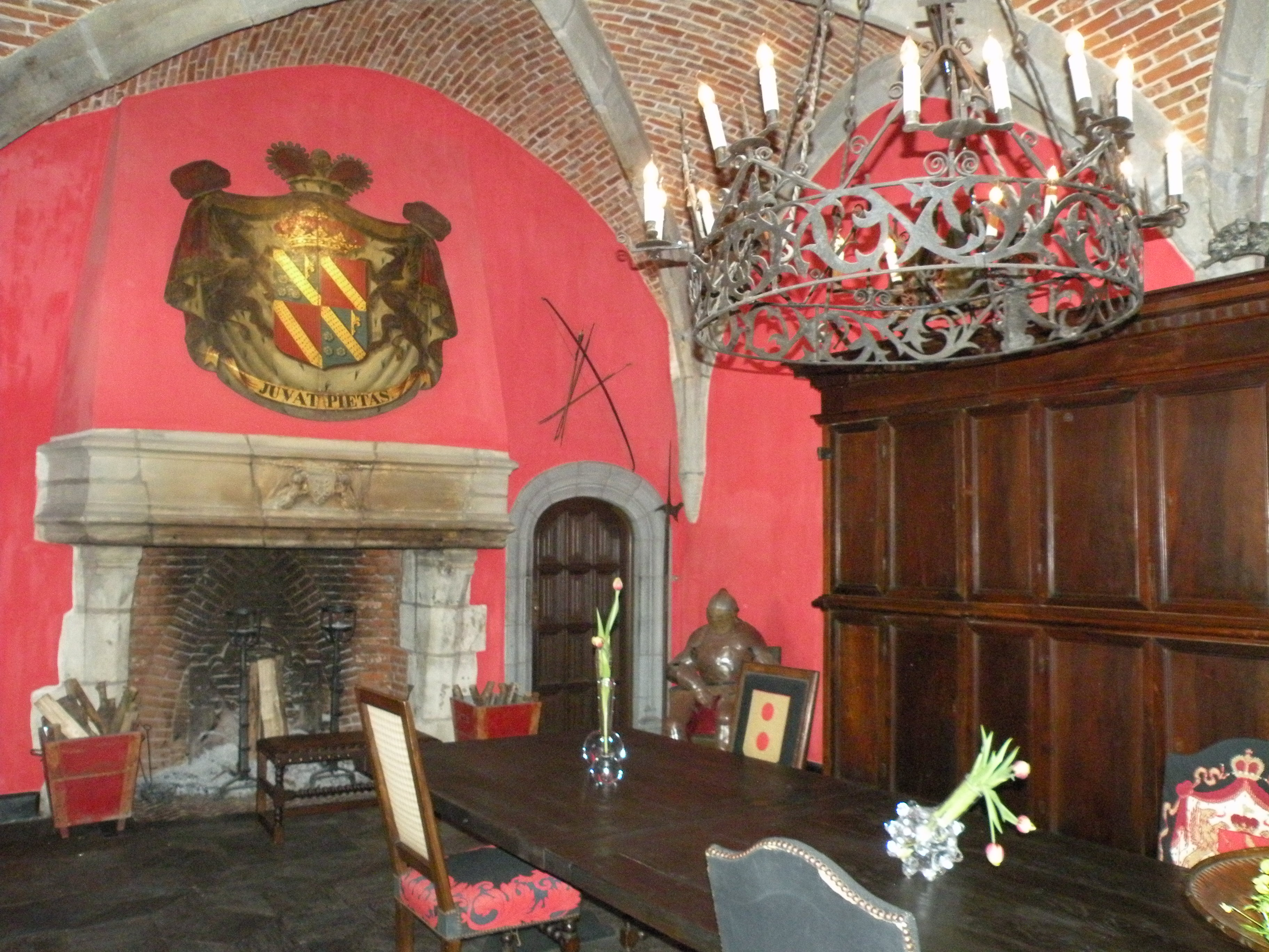 chateau de Chimay - salle d'armes